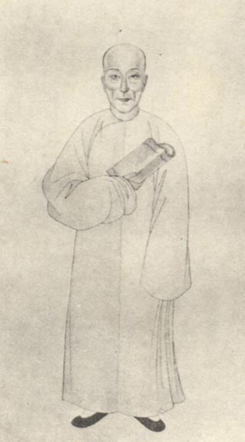 清代学者。